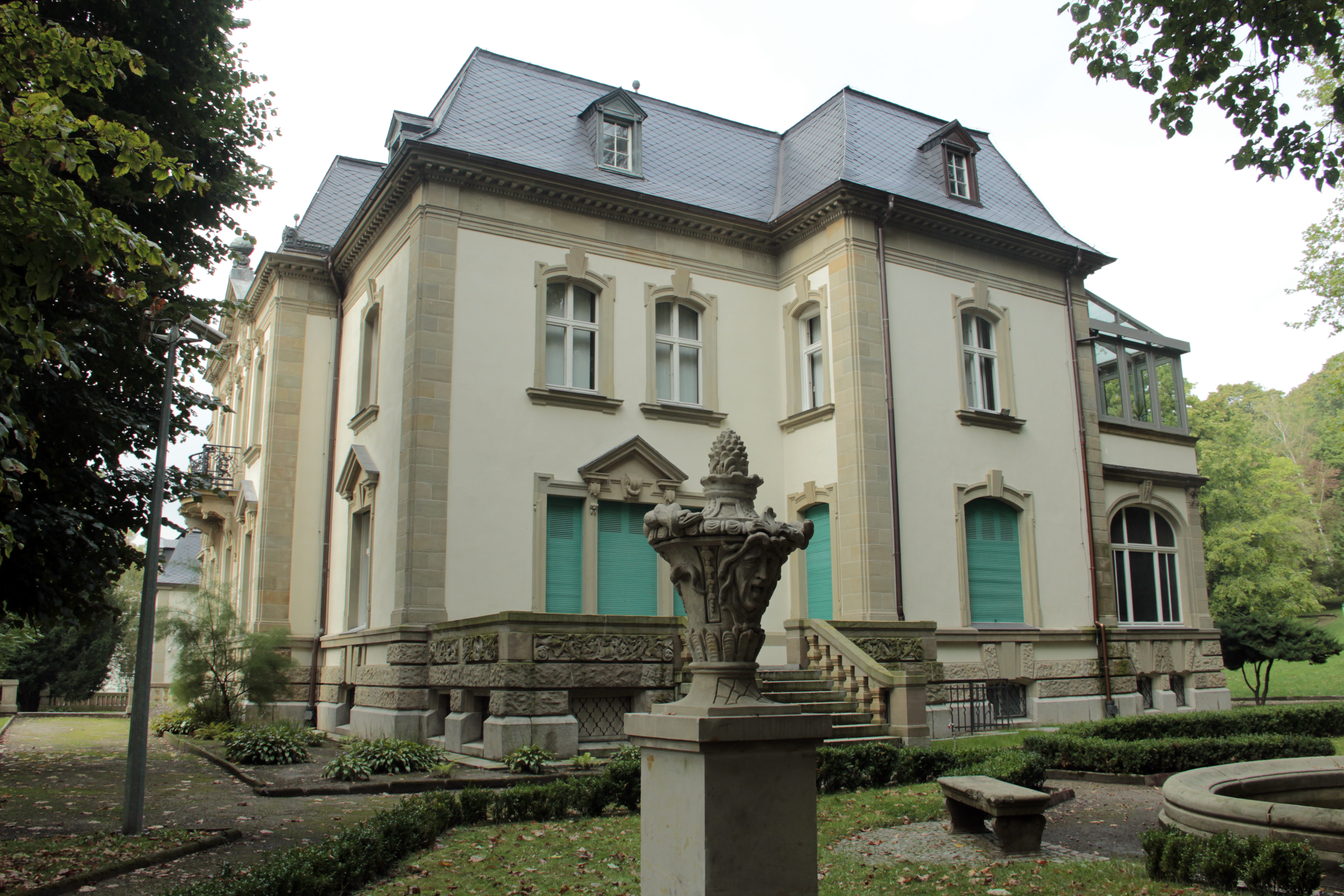 Gorzów Wielkopolski, willa, ob. muzeum, 1903